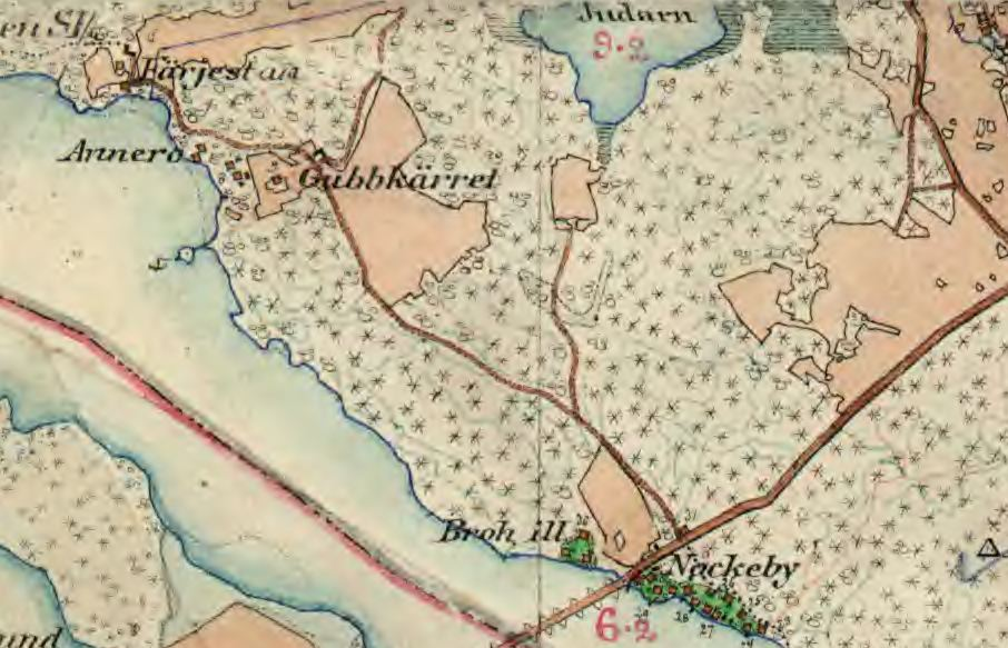 Gubbkärrets gård på Häradsekonomiska kartan